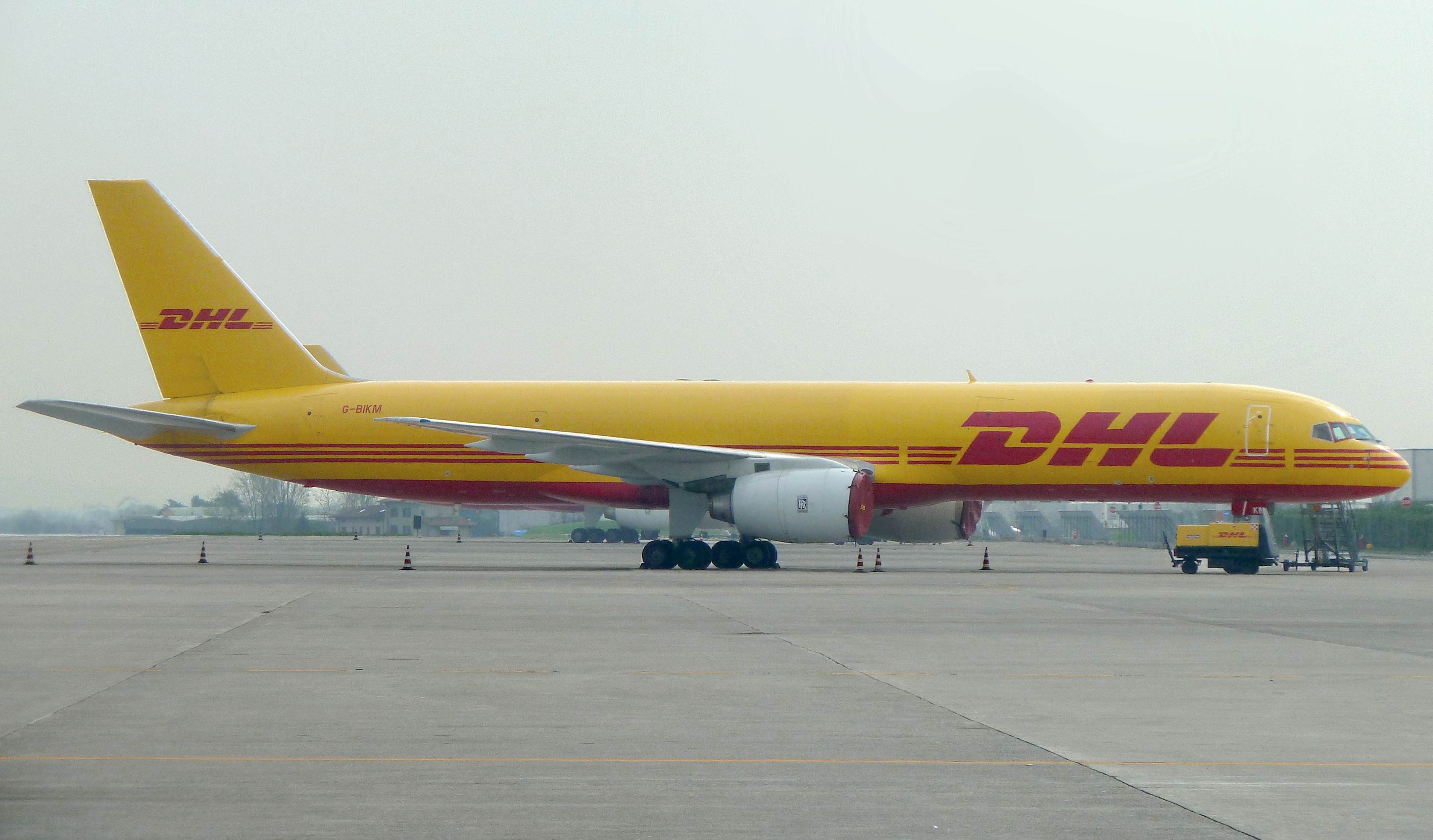 DHL 757